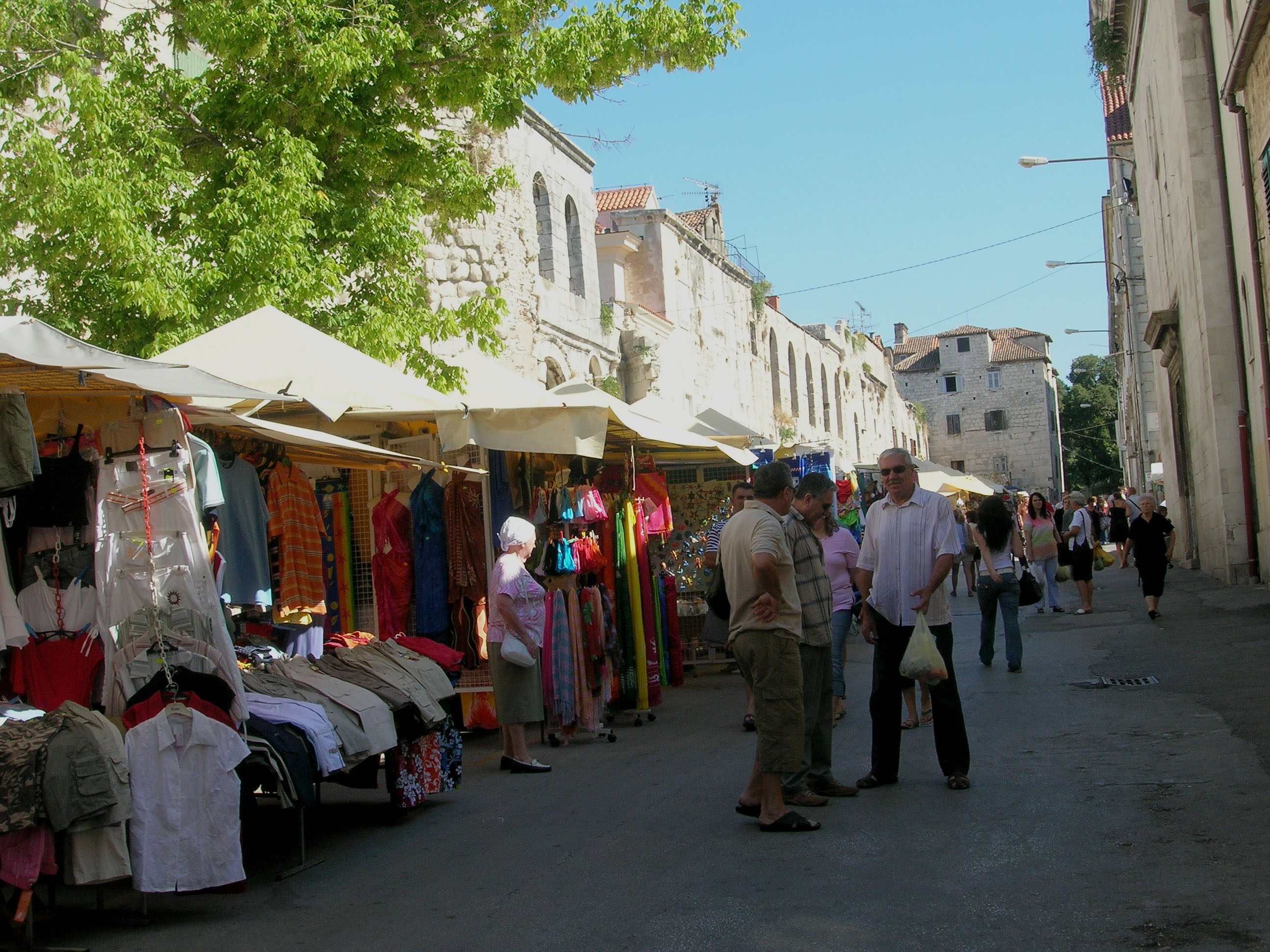 Split: De Maart laanscht d'Festungsmaueren.